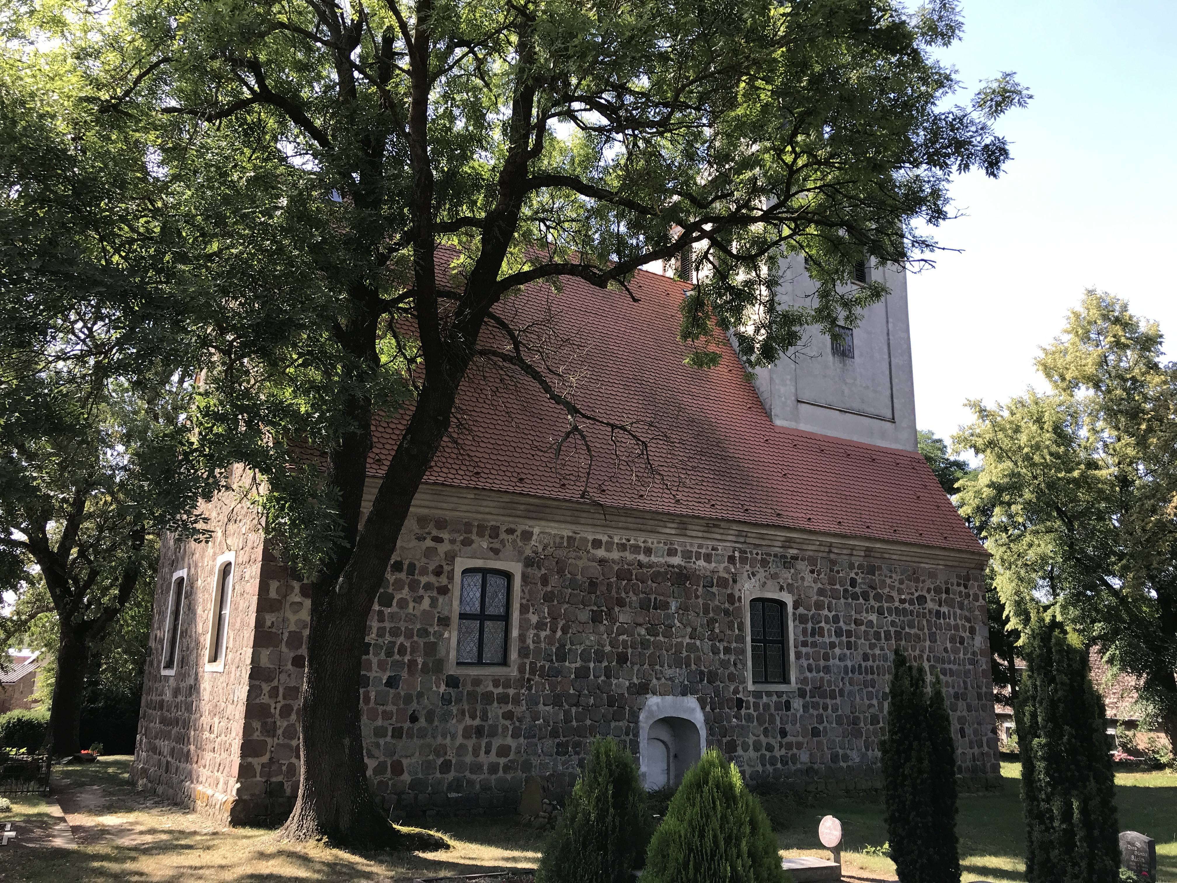 Die Kirche Groß Luckow ist eine Feldsteinkirche aus dem 13. Jahrhundert in Groß Luckow, Landkreis Vorpommern-Greifswald in Mecklenburg-Vorpommern. Im Innern steht unter anderem ein Altarretabel aus dem Jahr 1623.